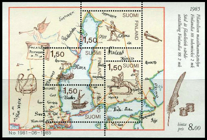 Первый почтовый блок Финляндии, 1985